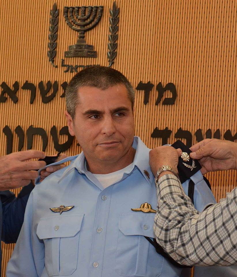 שלומי מיכאל